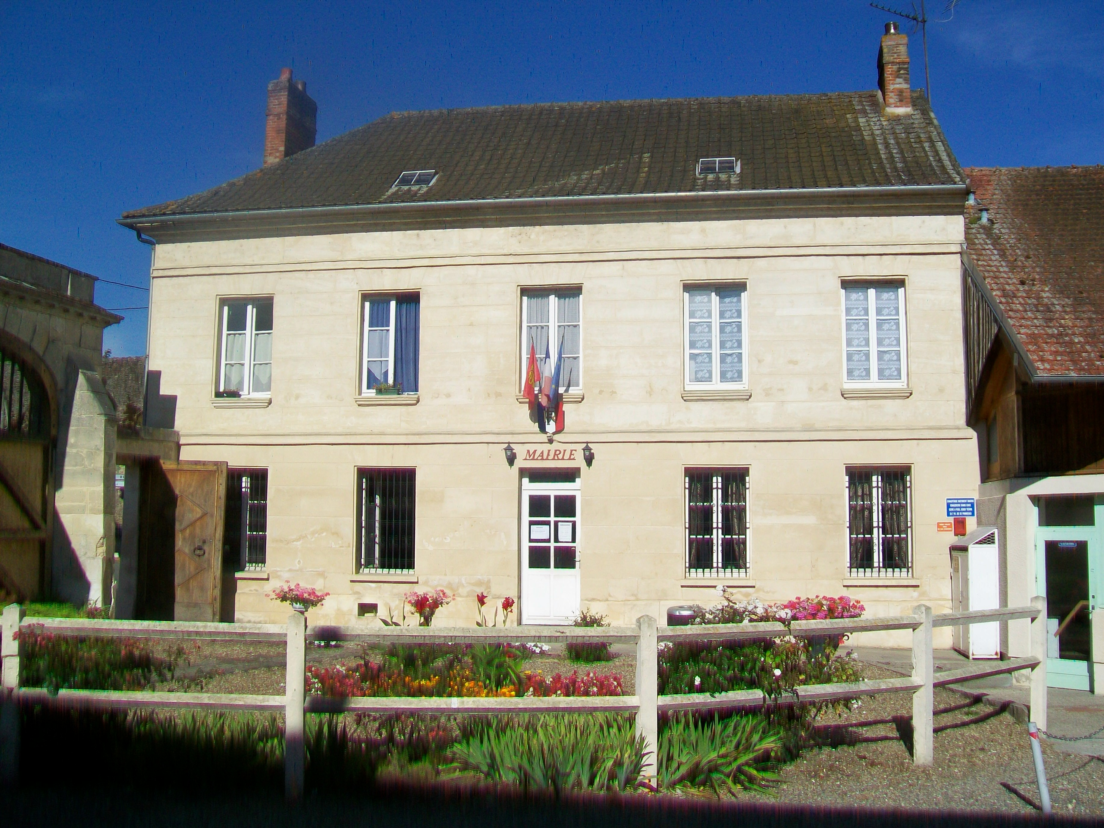 La mairie, au hameau des Bordeaux de Saint-Clair, route de Rouen (ancienne RN 14).